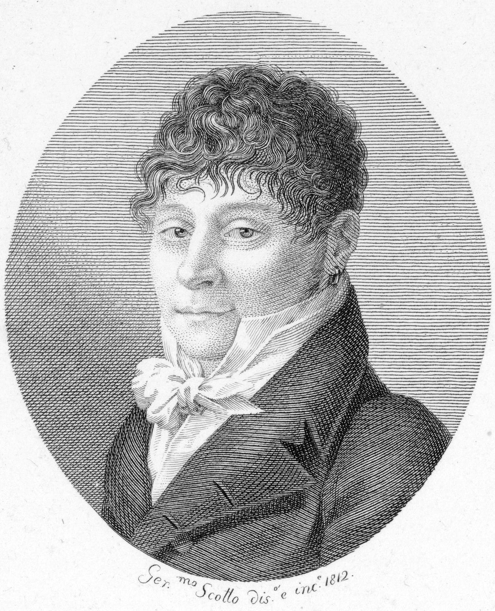 Pietro Generali (* 23. Oktober 1783; † 3. November 1832)